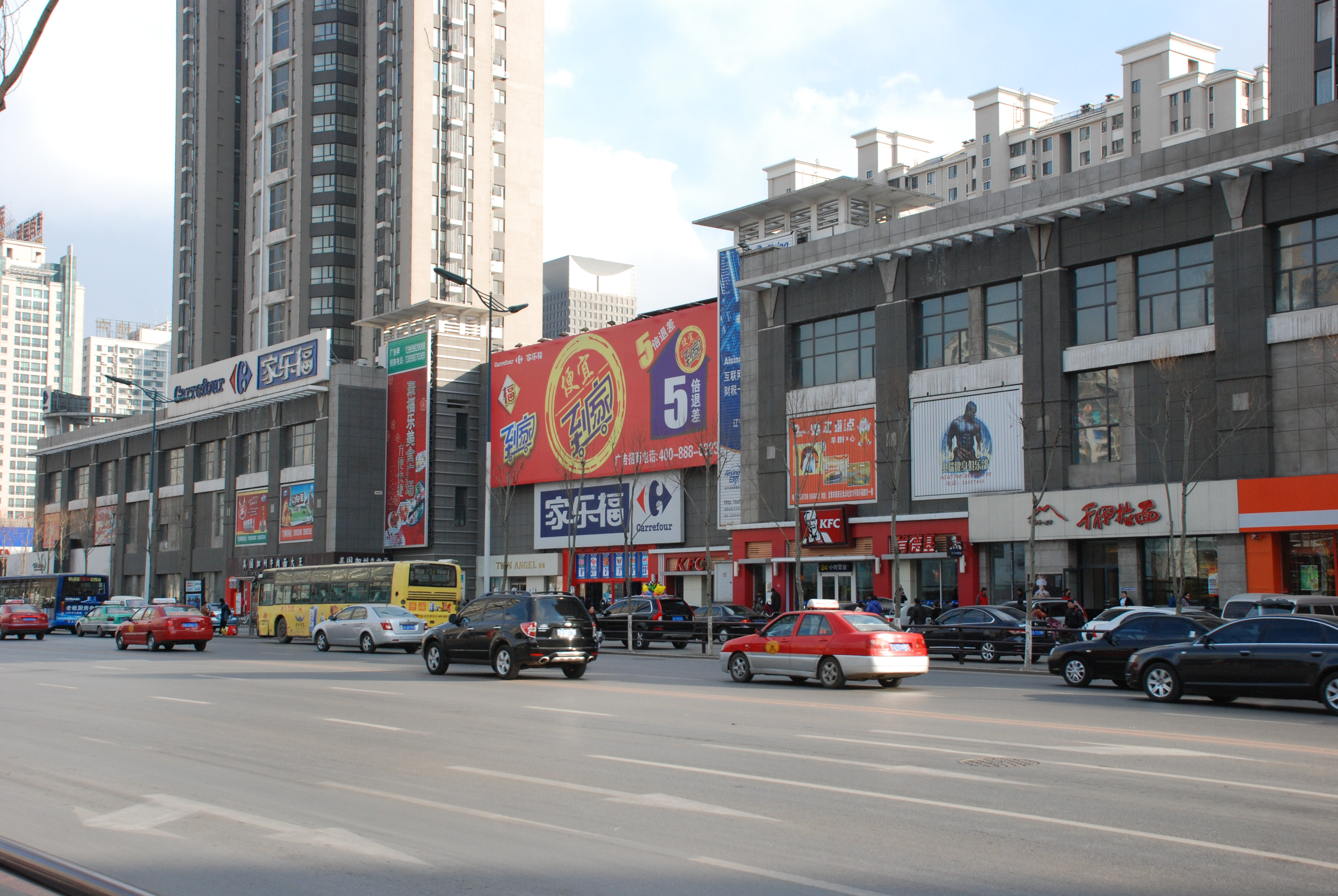 中文（中国大陆）: 沈阳云峰家乐福超市